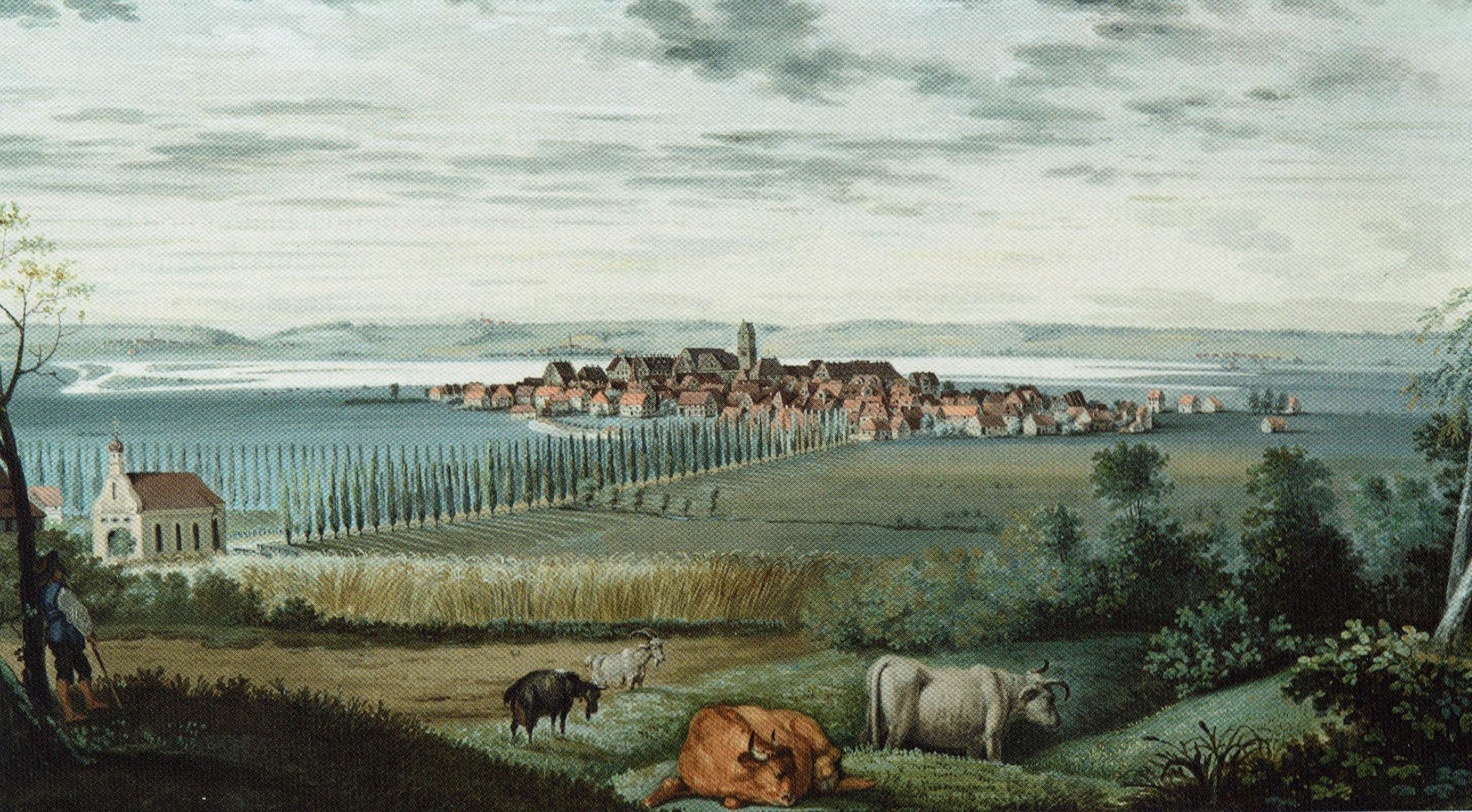 Buchau mit dem Federsee. Gouache auf Papier